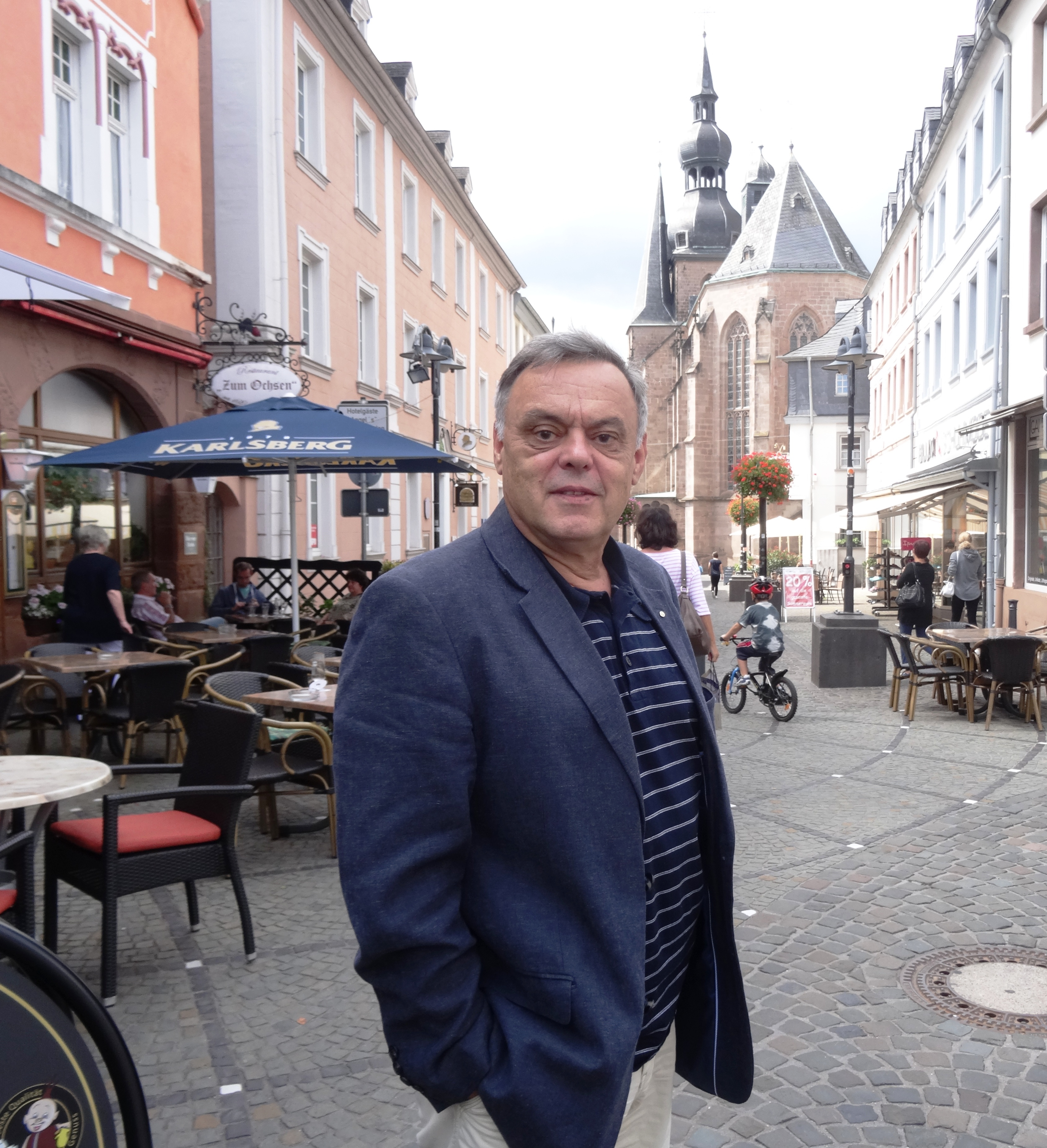 Portrait Manfred Spoo